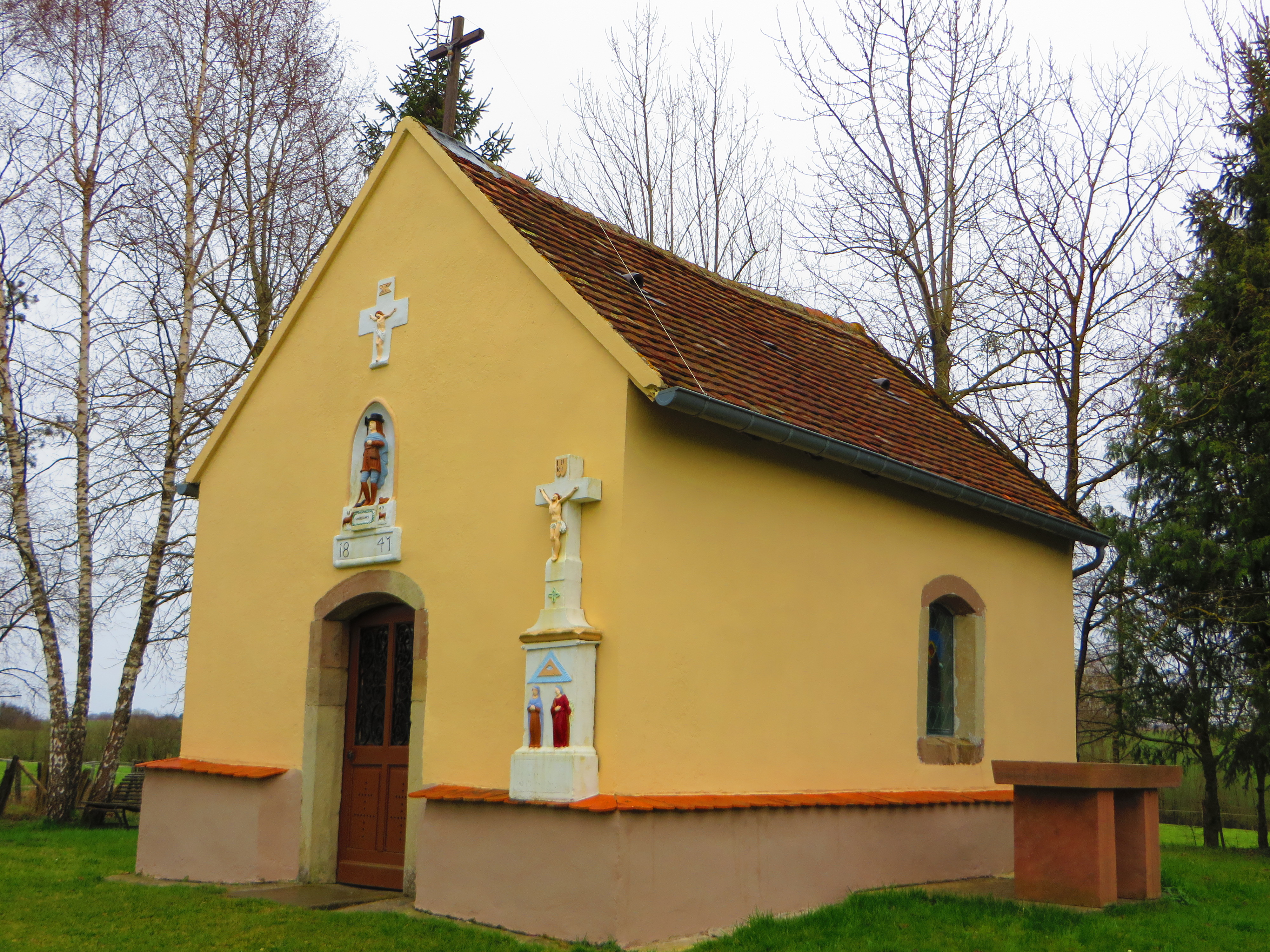 Rahling chapelle